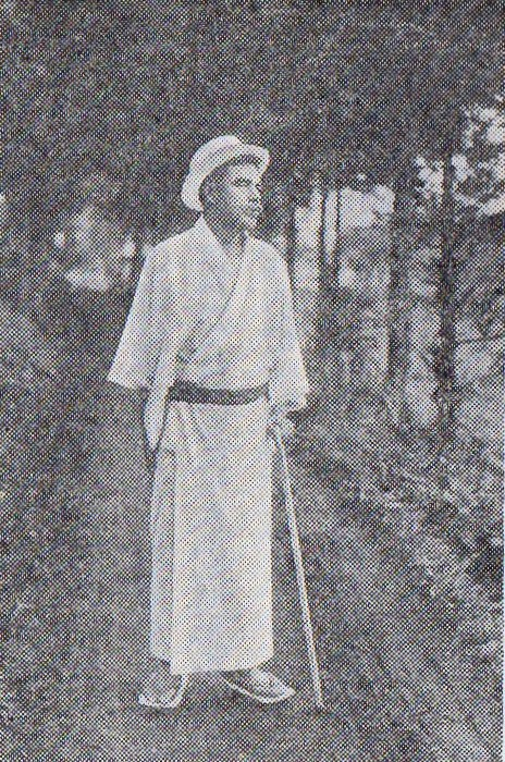 御殿場で避暑の内村鑑三(1917年8月)